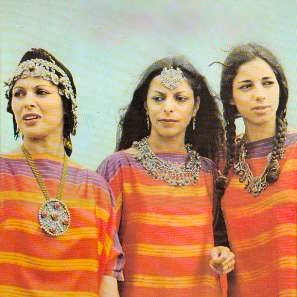 Djurdjura, groupe algérien de musique instrumentale et vocale d'expression kabyle.